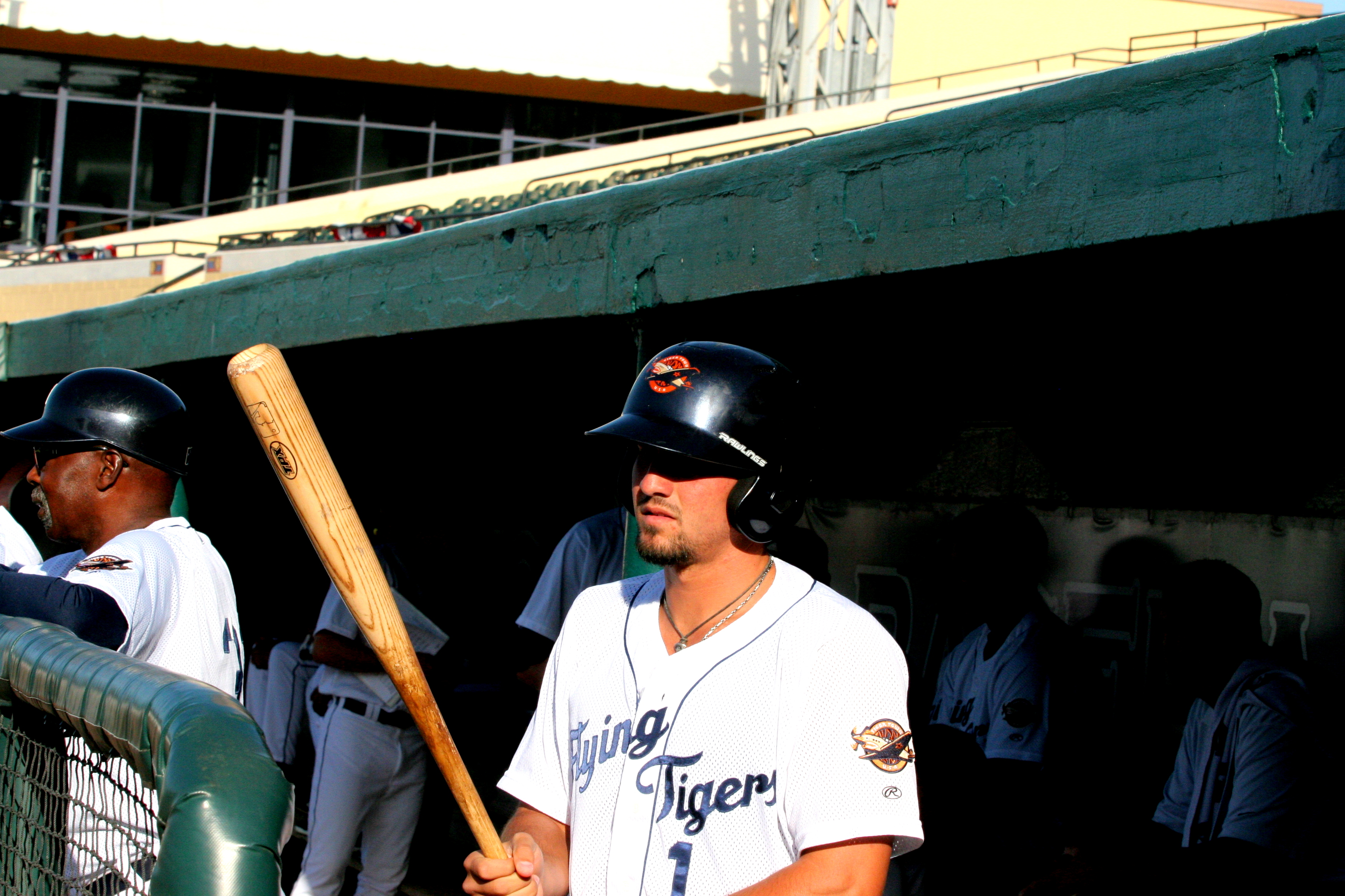 IMG_0027 Nick Castellanos